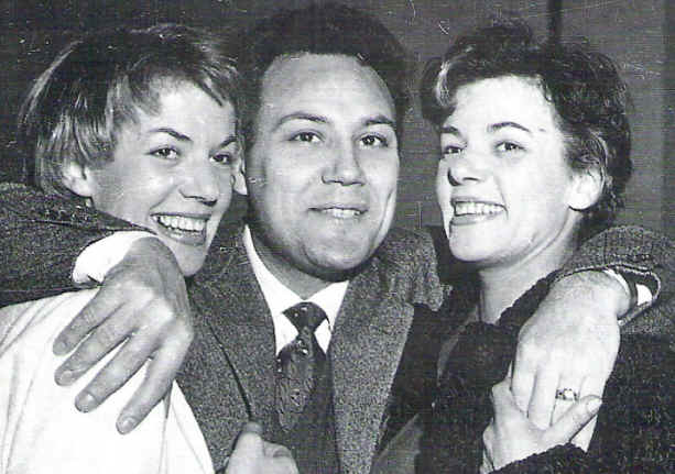 Descrizione: vedi titolo Fonte: 1954